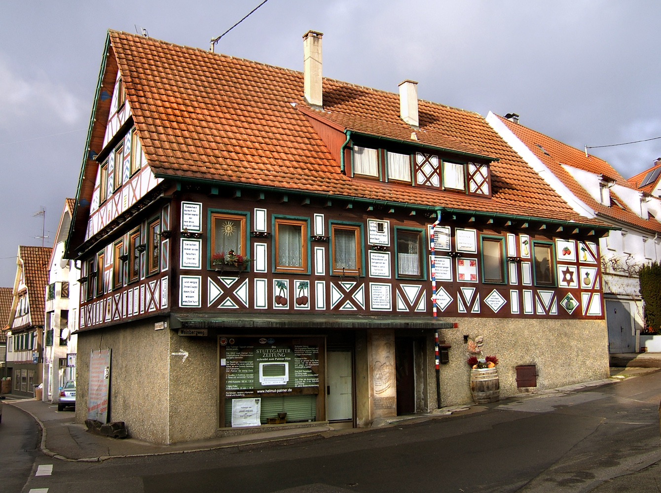 Das Haus von Helmut Palmer in Remshalden-Geradstetten in Deutschland. Das Fachwerkhaus ist über und über mit Parolen, Statements, Daten, Wappen und anderem geschmückt. Einige Zitate: "Unruhe ist erste Bürgerpflicht""Lieber Stein des Anstosses als anstössig""Ein kleiner Spatz wies Amtsleuten den Weg""Eine geniale Leistung des Schneiders von Ulm vom simplen Volk verkannt und verspottet""Dommheit dui isch so: selbr merkt mr nex drvo""Und vergib ihnen nicht, denn sie wissen, was sie tun"